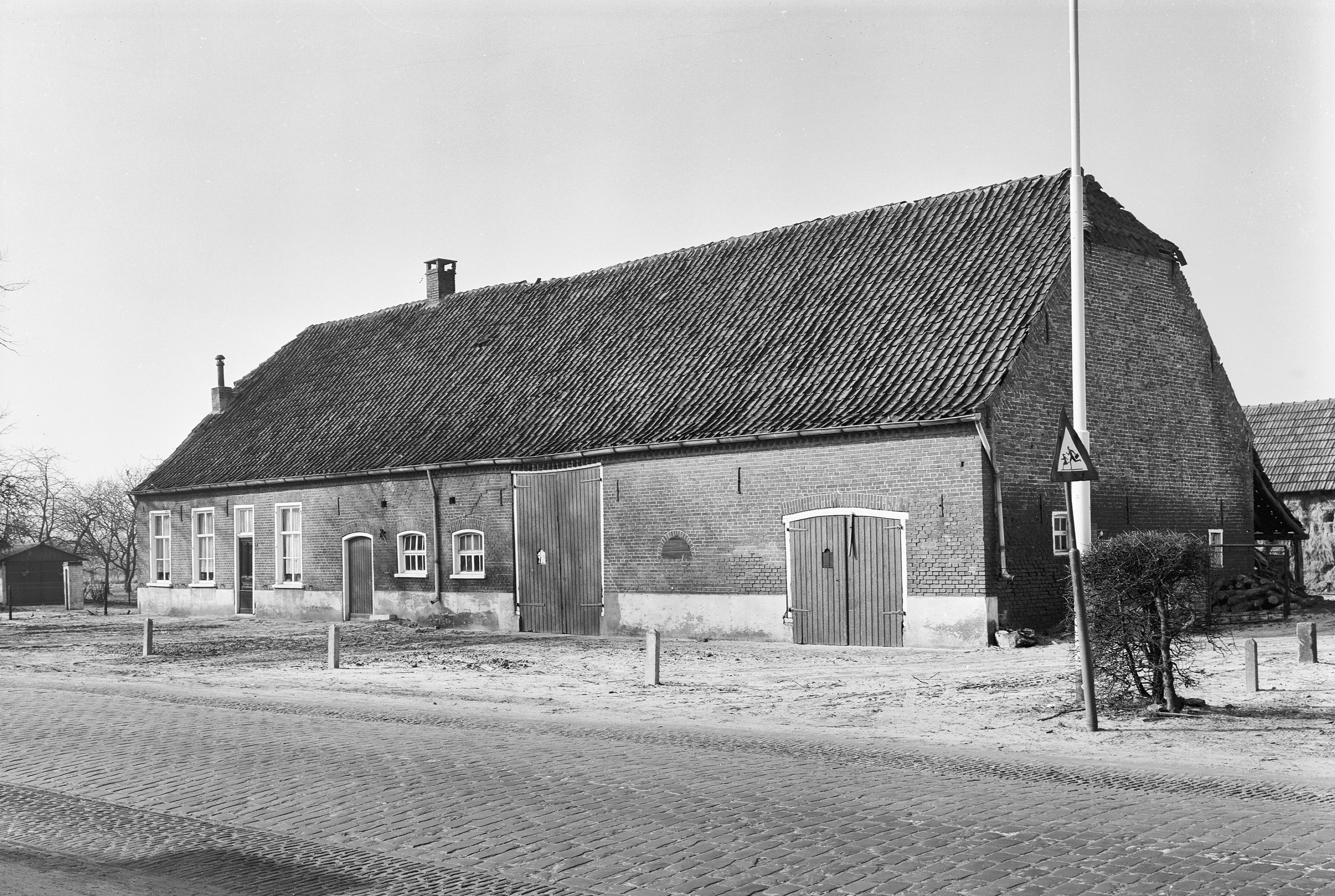 aanzicht